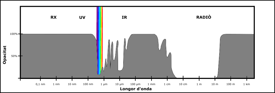 Opacitat de l'atmosfèra terrèstra en foncion de la longor d'onda.